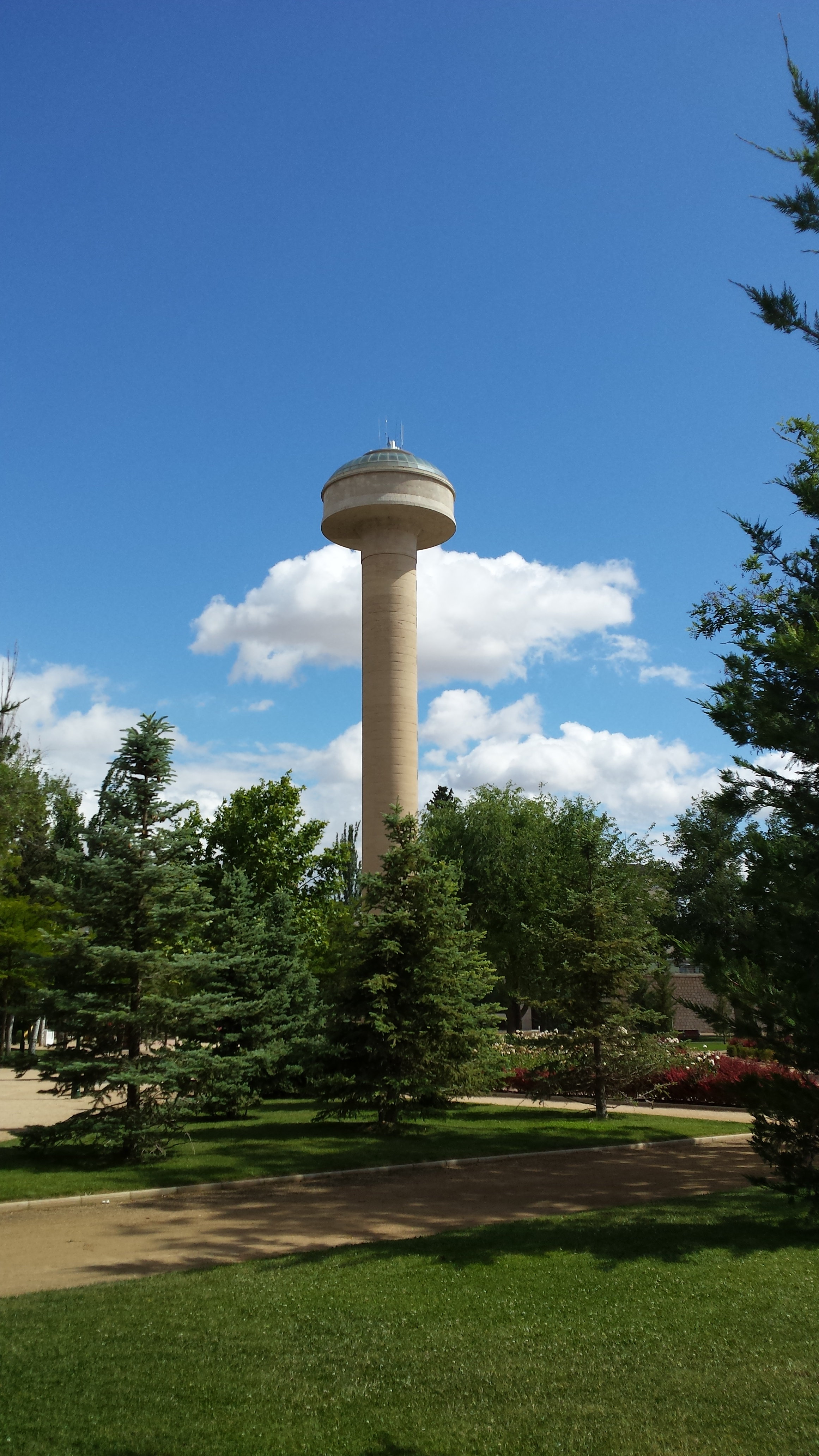 Depósito de Agua de la Fiesta del Árbol. Parque de la Fiesta del Árbol. Albacete